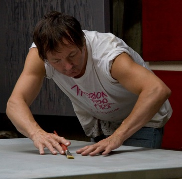 Gerhard Flekatsch, Einblick ins Atelier, Vorbereitung auf die Ausstellung Gestische Formulierungen